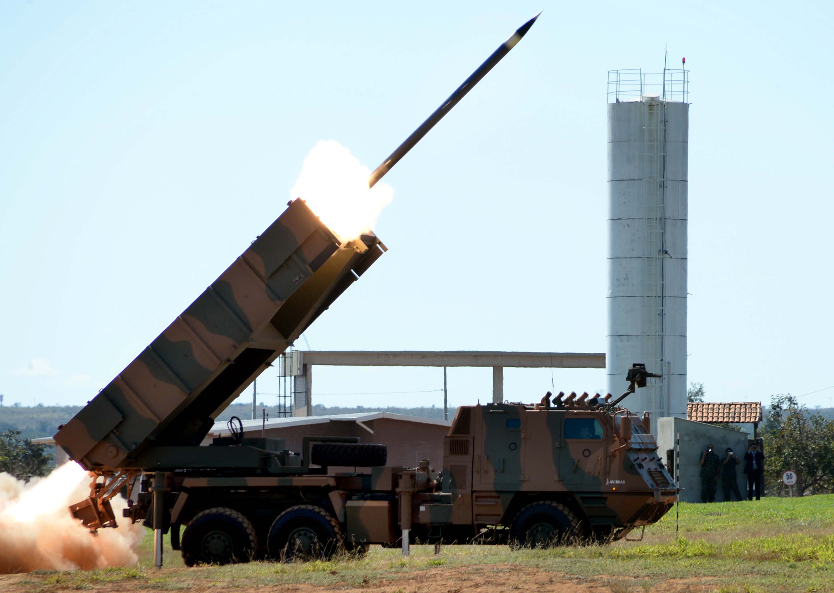 06/06/2014, Formosa - GO Fotos: Jorge Cardoso